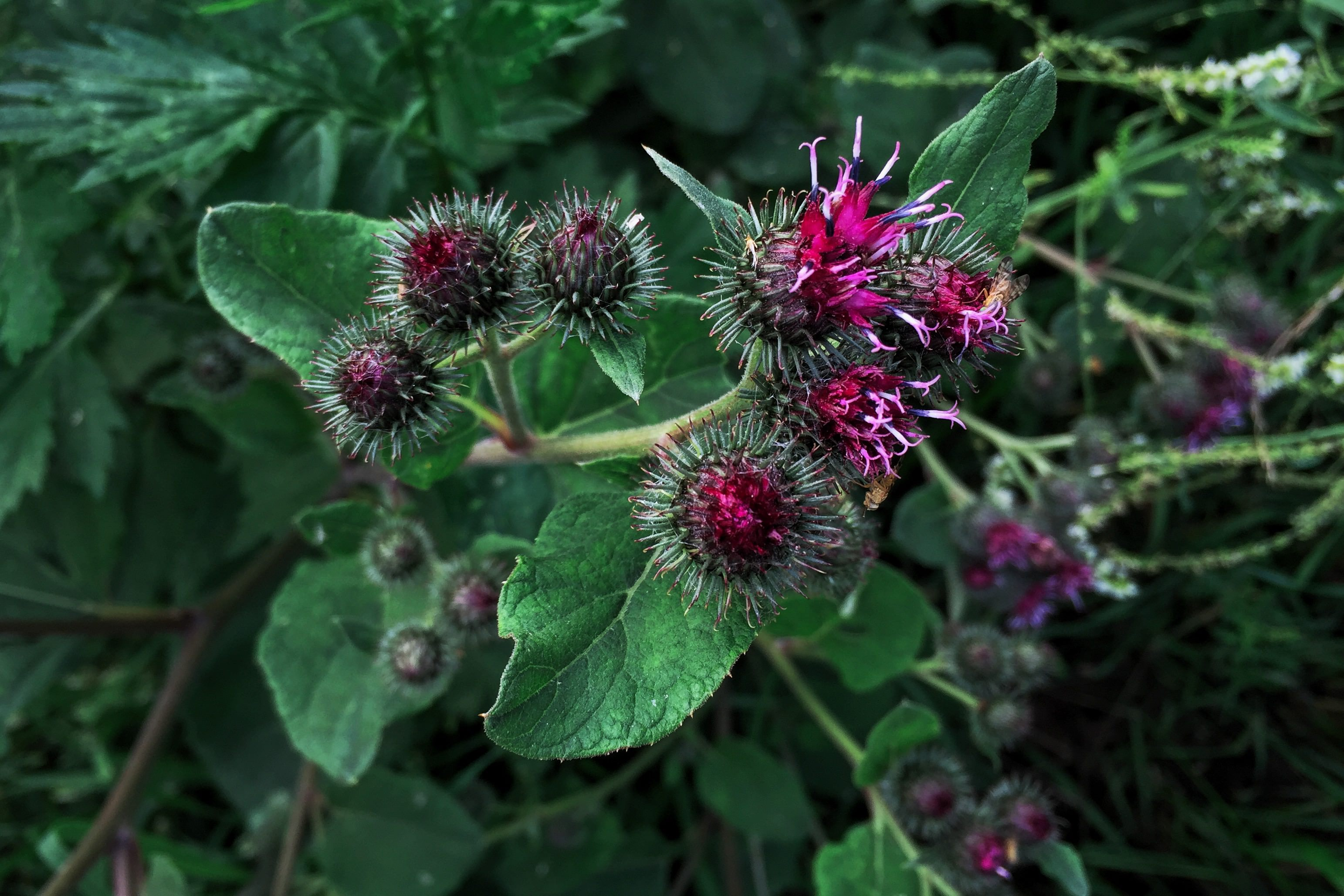 Репейник. Москва, долина Яузы, территория в пойме на слиянии рек Чермянка и Яуза. Памятник природы «Долина р. Яузы от Кольской ул. до пр. Русанова»